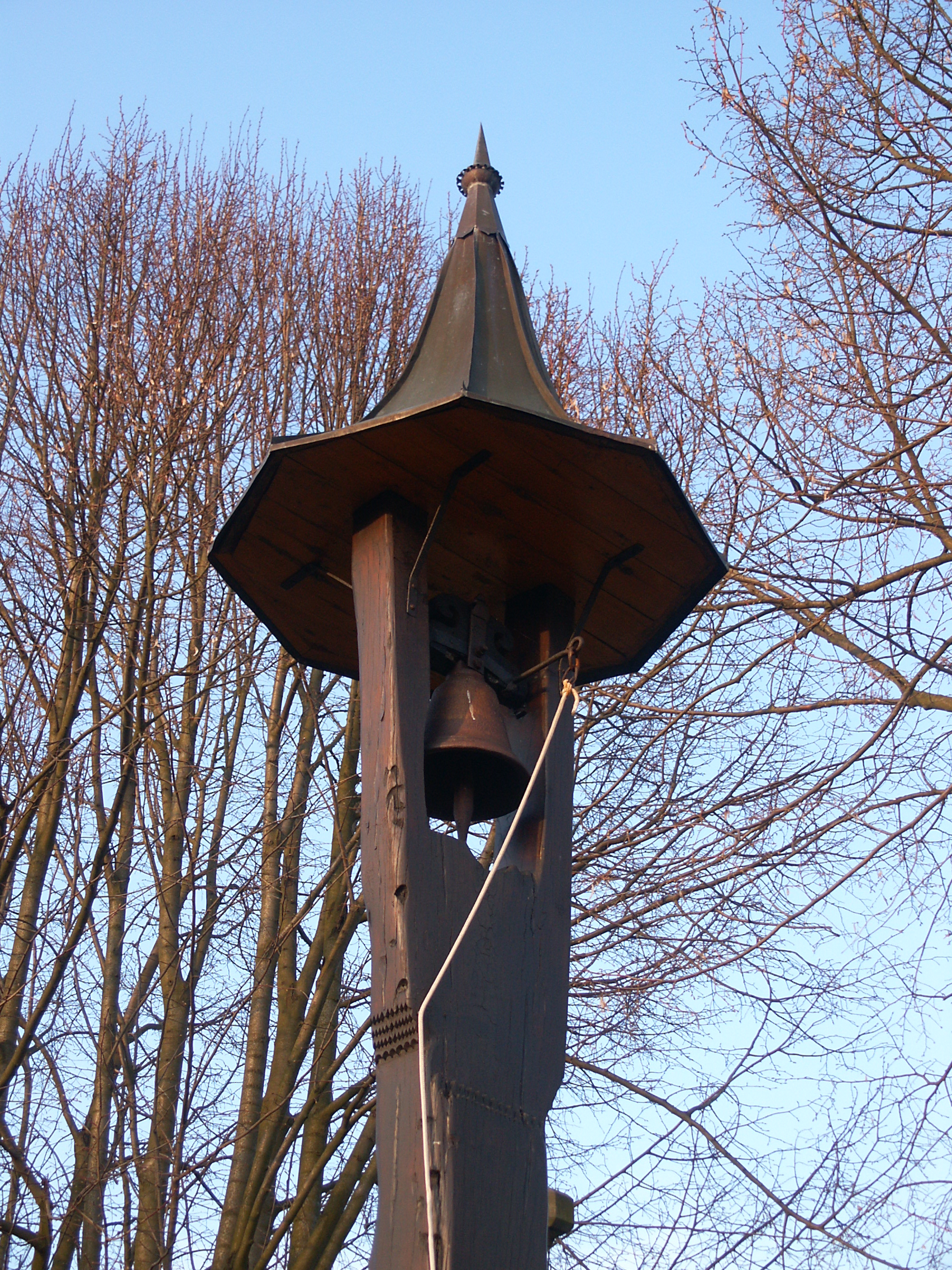 Ohaveč - zvonice z roku 1872